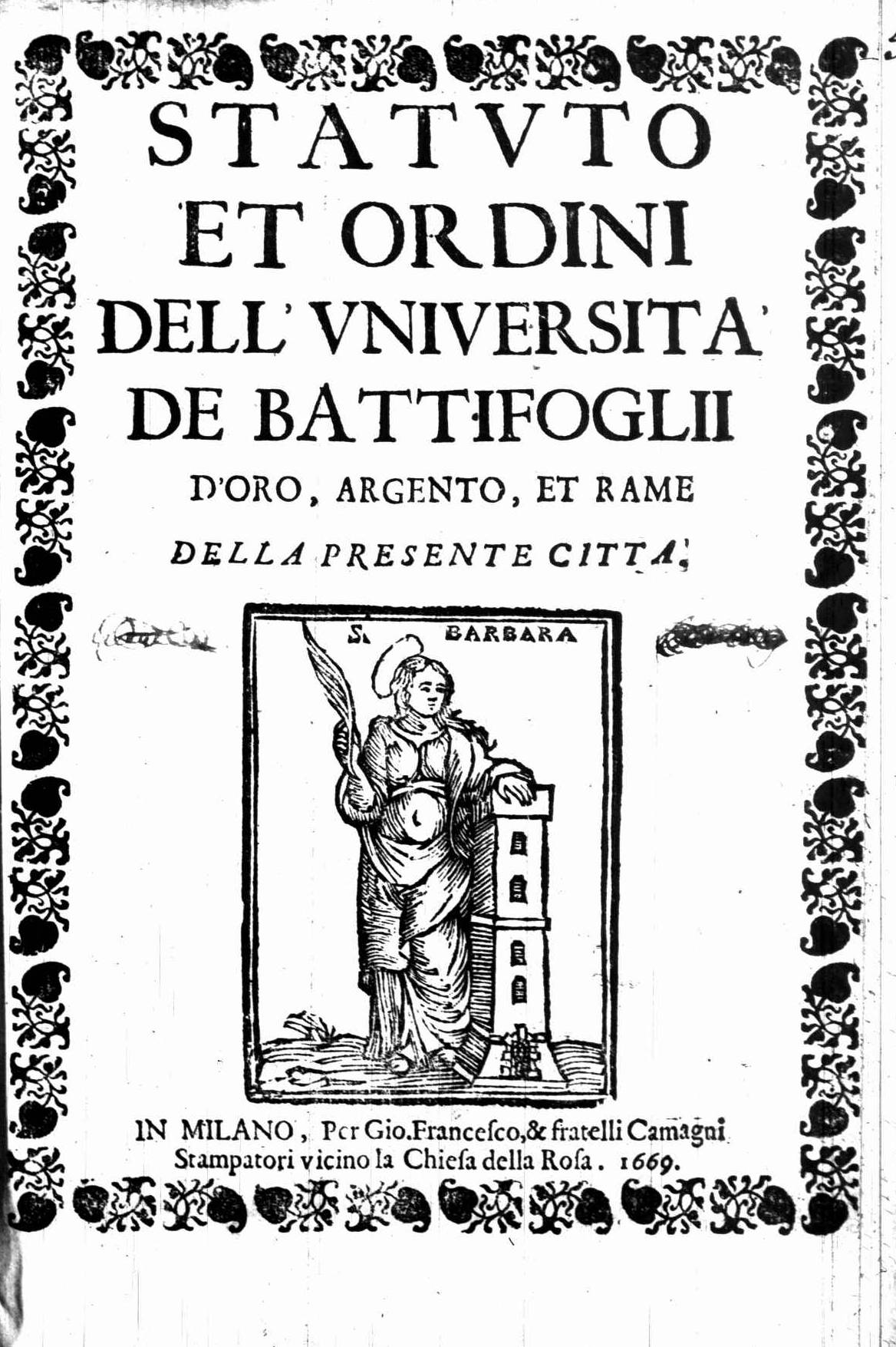 Frontespizio